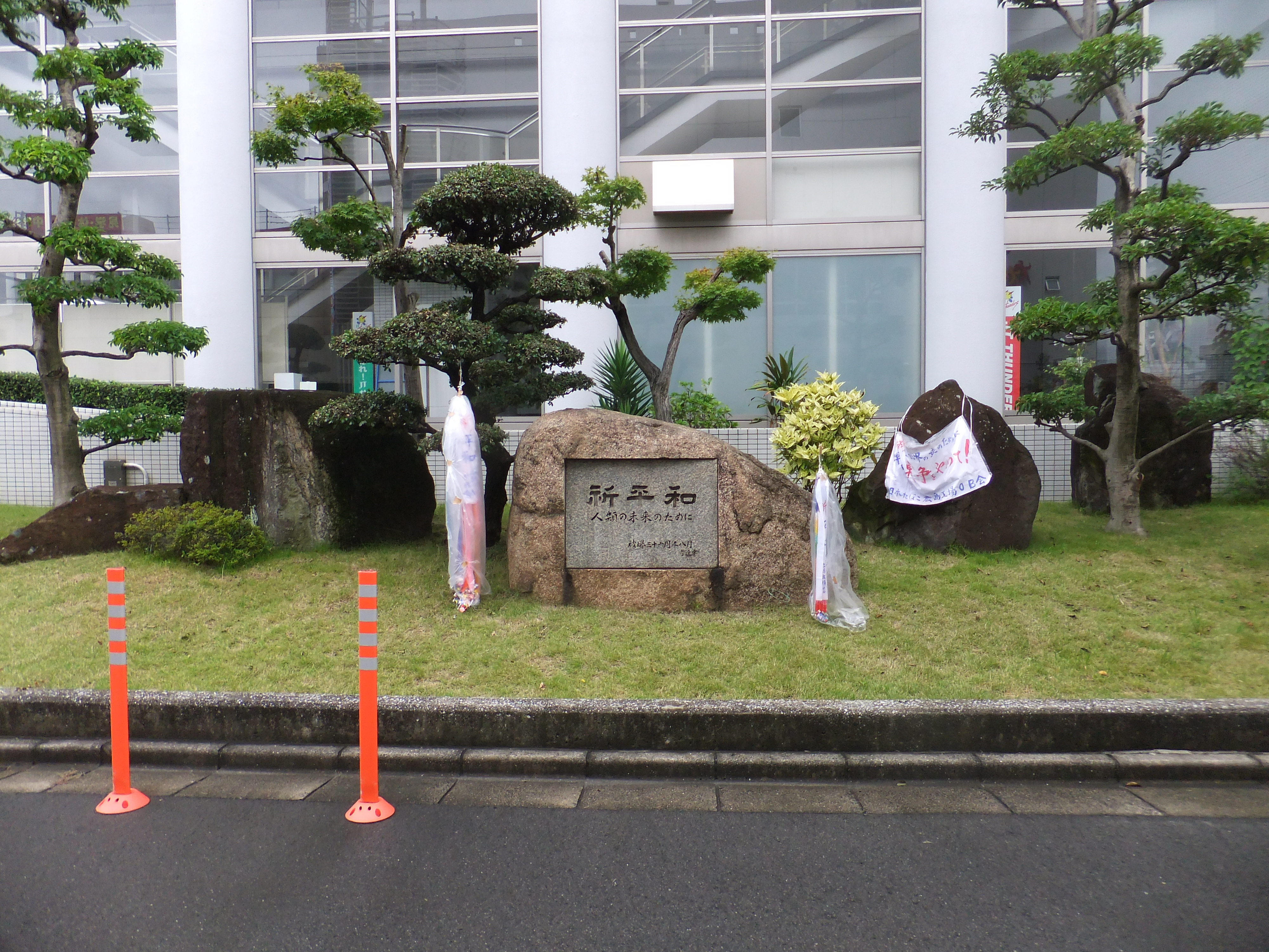 日本専売公社広島工場祈平和・碑